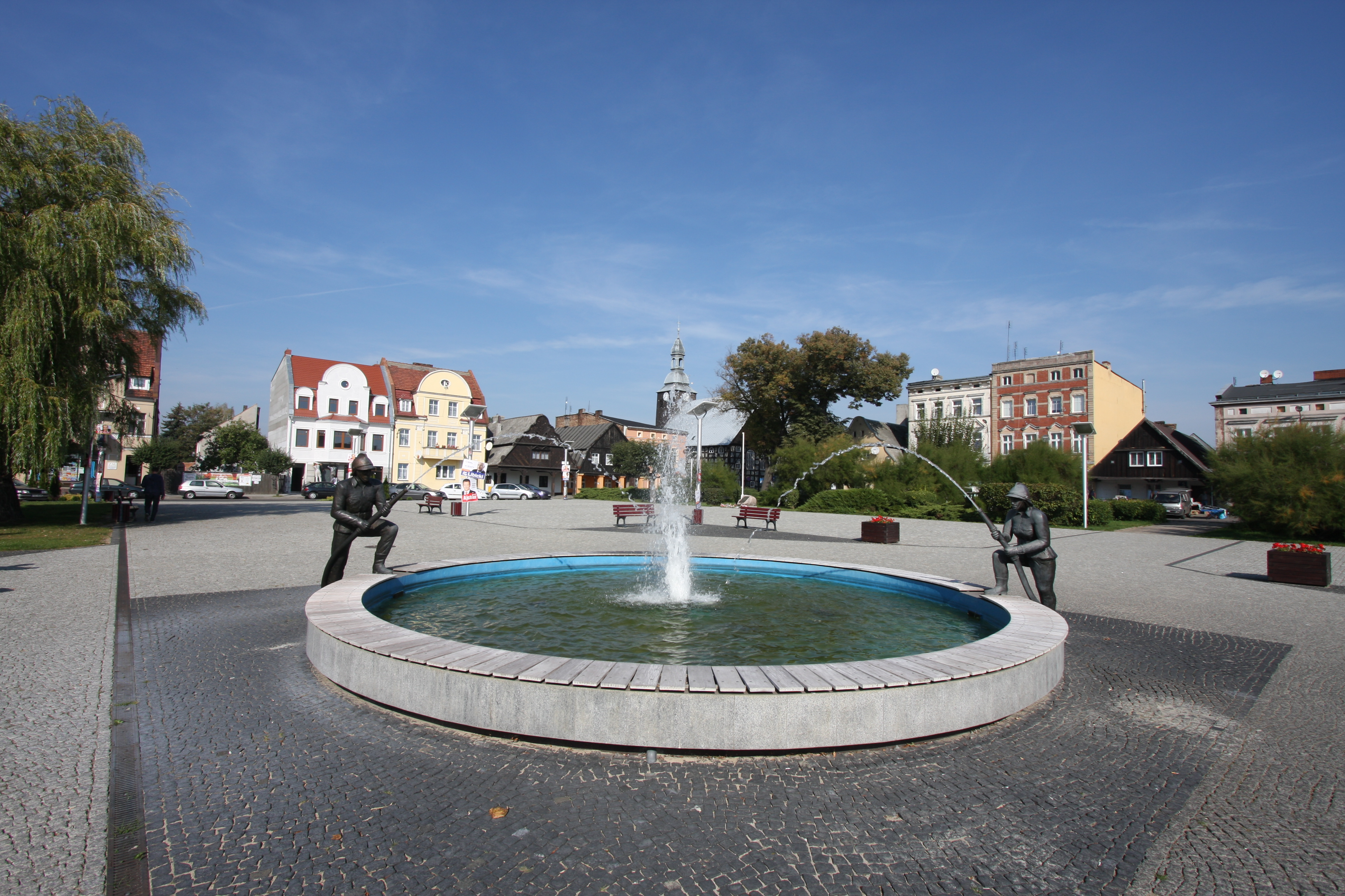 Rakoniewice, fontanna na rynku